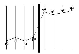 Fig.2 Situación típica donde el filtro puede activarse esquema de muestras para el deblocking filter descrito